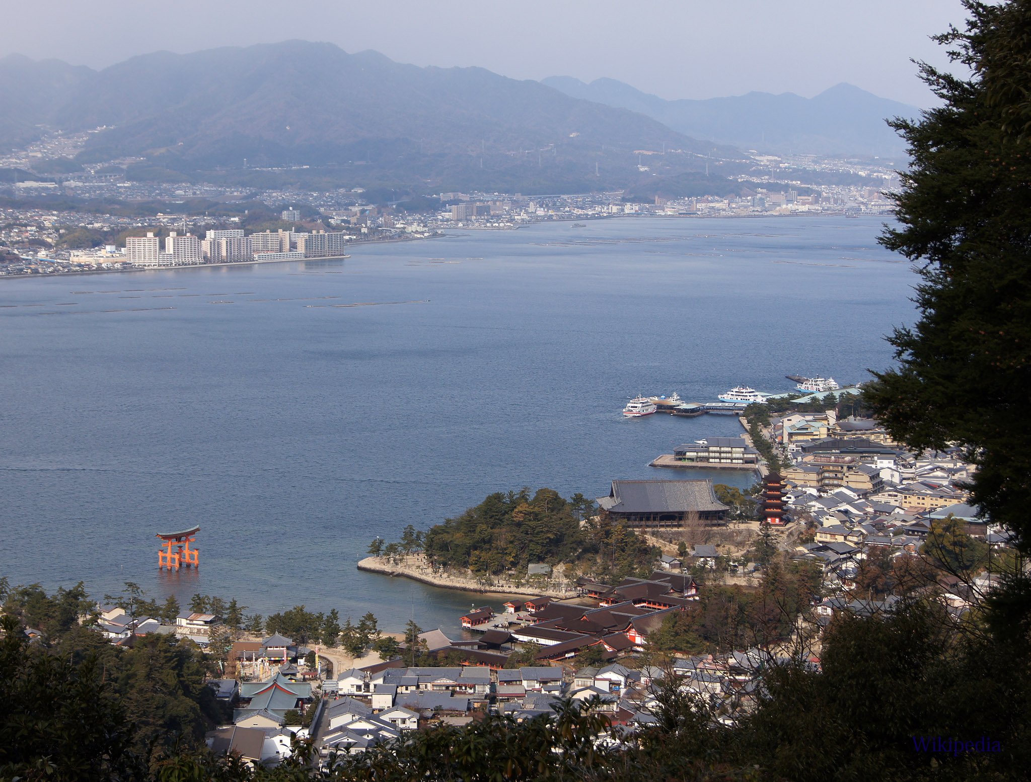 弥山の大聖院コースより眺めた厳島神社